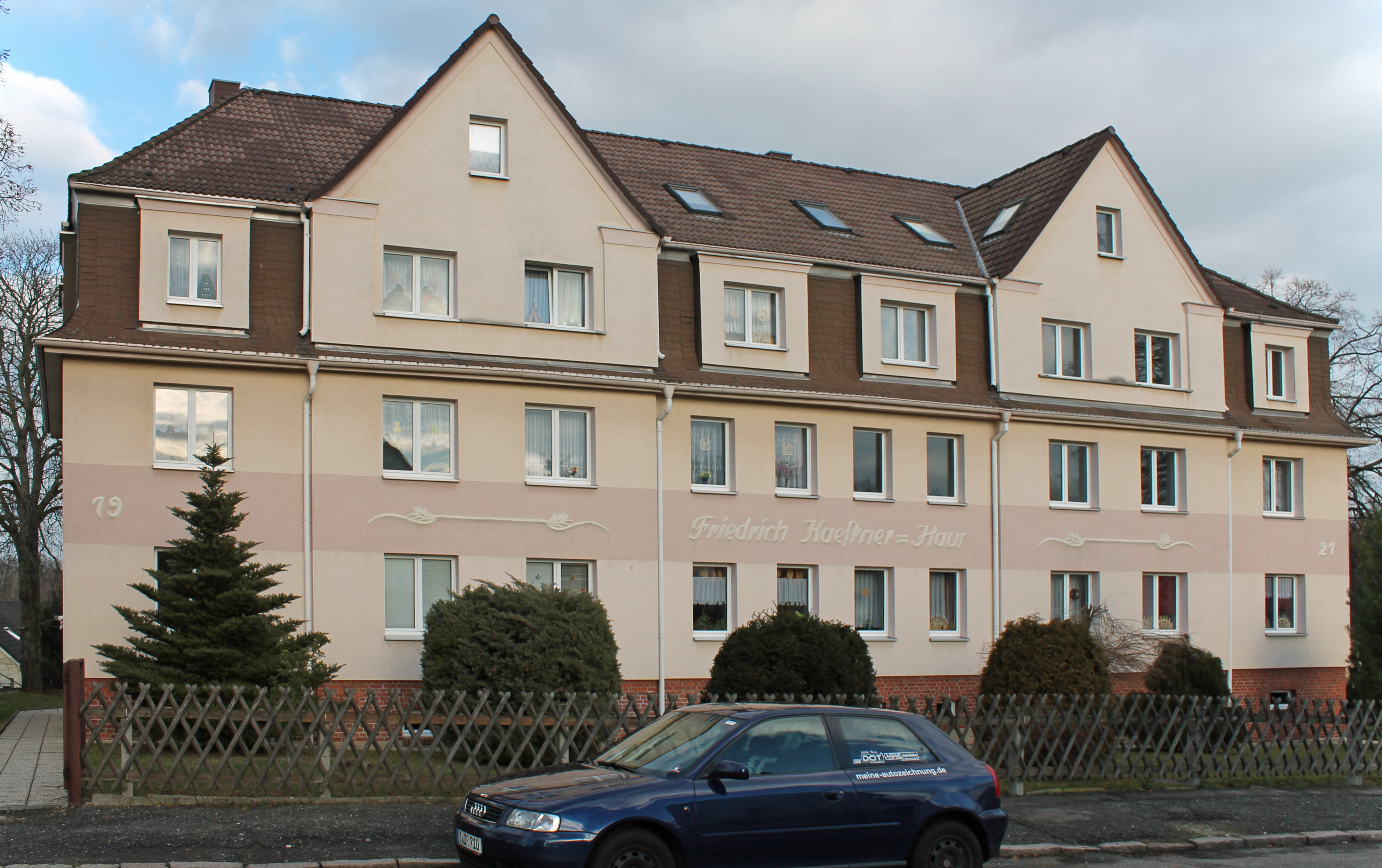 Das sogenannte Kästner-Haus in Oberhohndorf, Stadt Zwickau, Sachsen, Deutschland.